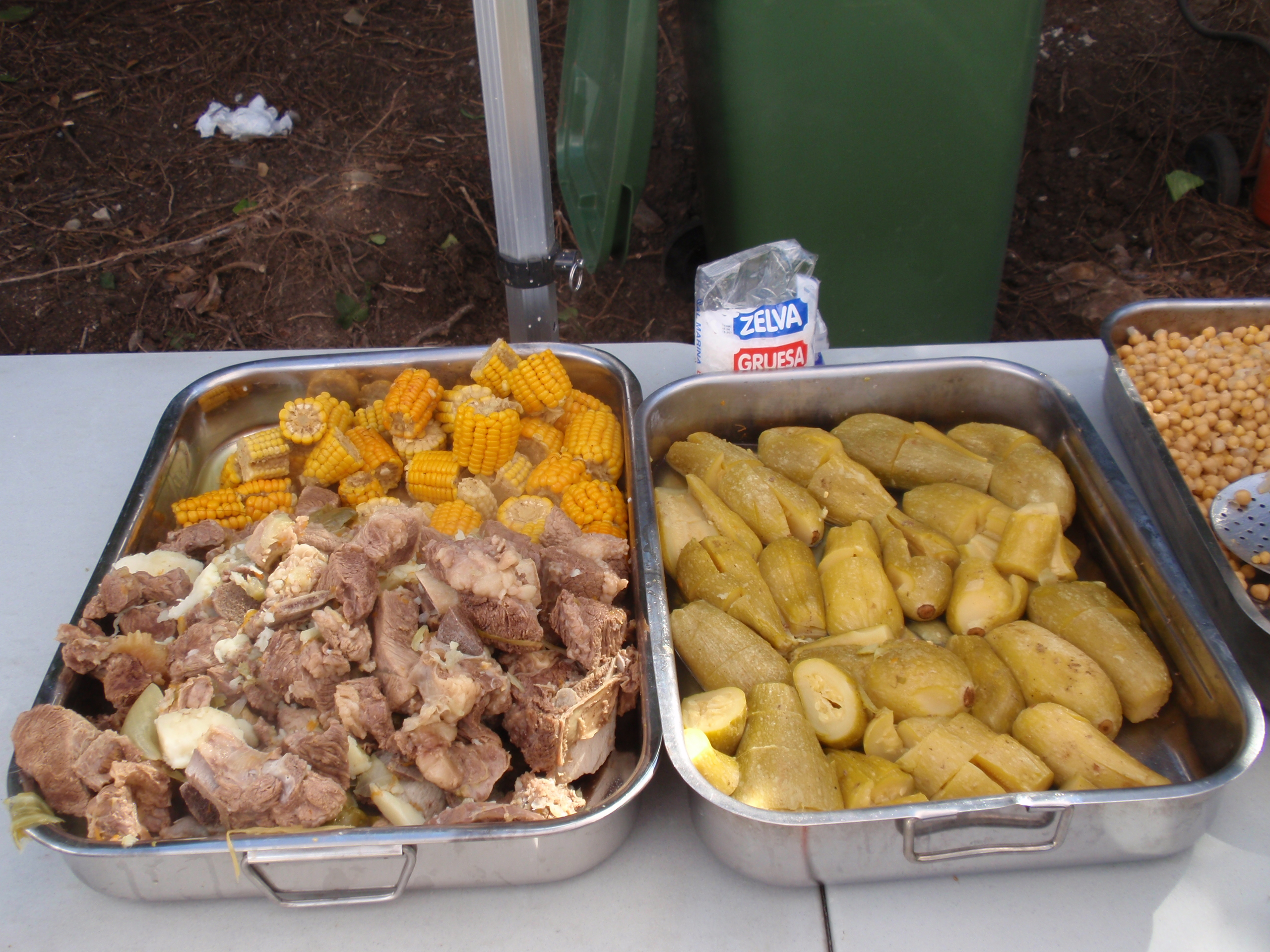 Puchero Canario à Santa Brigida